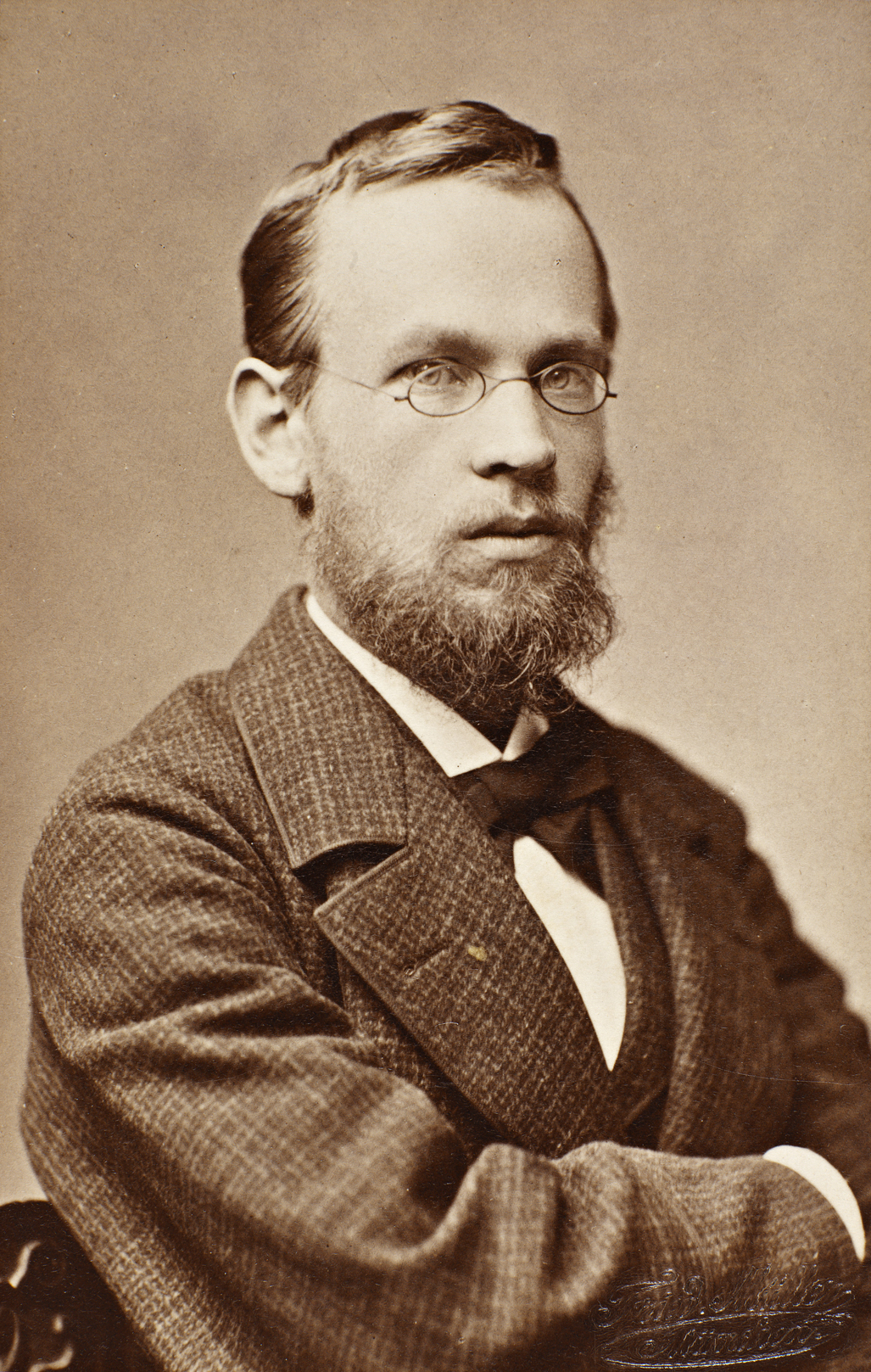 Tittel / Title: Portrett av Erik Werenskiold (1855-1938) Motiv / Motif: Visittkort. Sted / Place: Tyskland, München Bildesignatur / Image Number: blds_01571